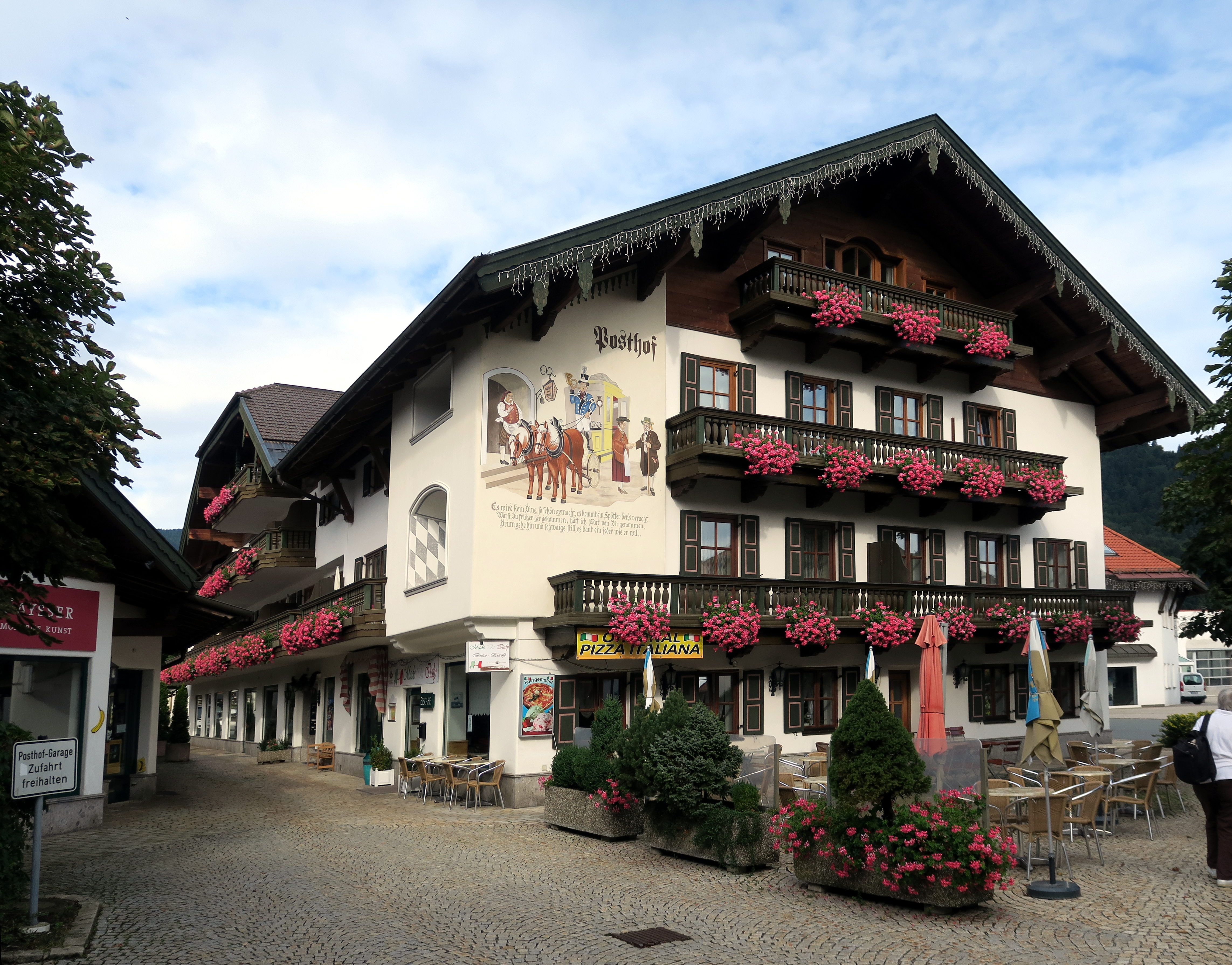 Baudenkmal in Ruhpolding, Hauptstr.